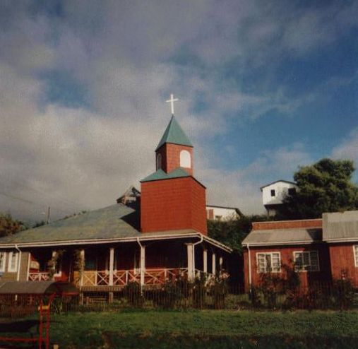 Capilla en el barrio Gamboa, Castro, isla de Chiloé, Chile